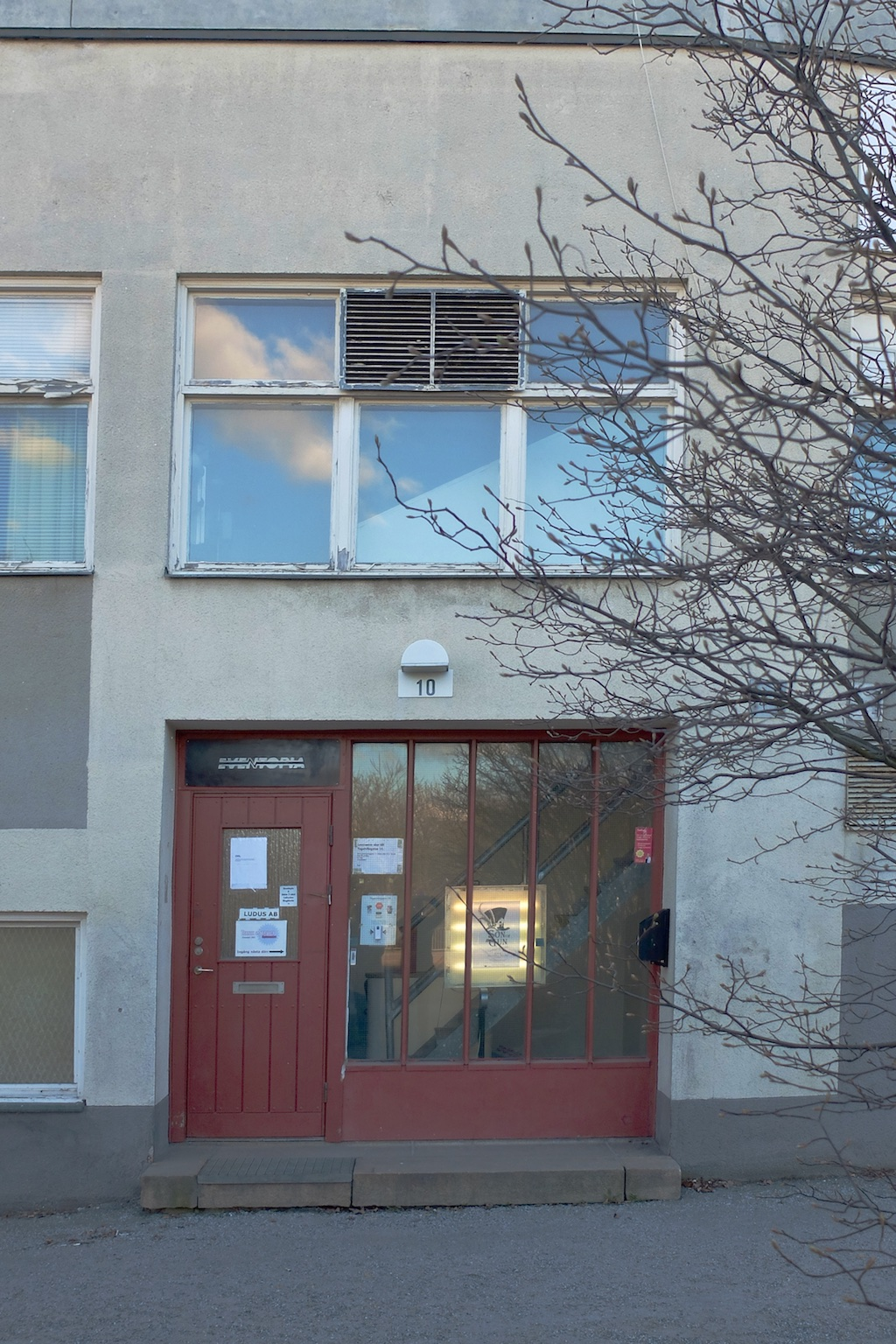 Barnängsgatan 10